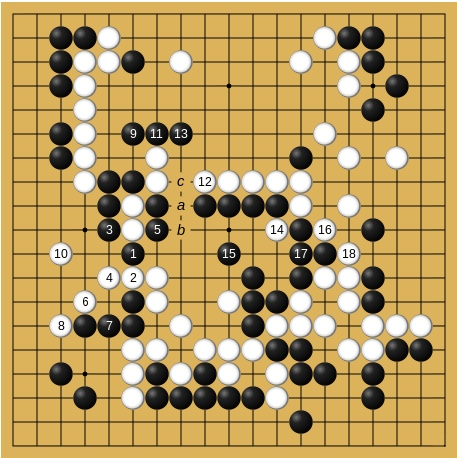 1959年7月25-26日 第14期本因坊戦挑戦手合七番勝負第5局 高川秀格-木谷實(先番) 109-126手目